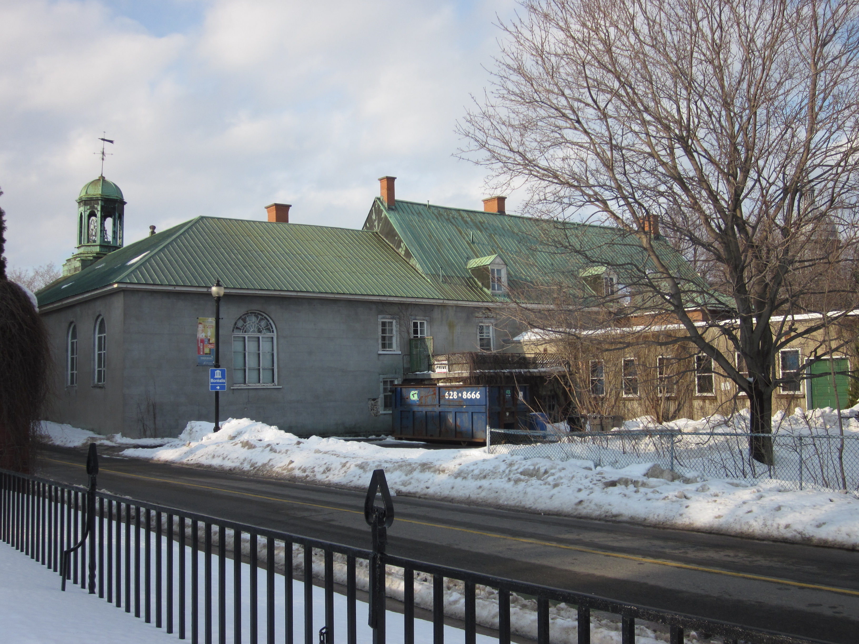 Église et prestataire de l'église Saint-James à Trois-Rivières vu de l'arrière